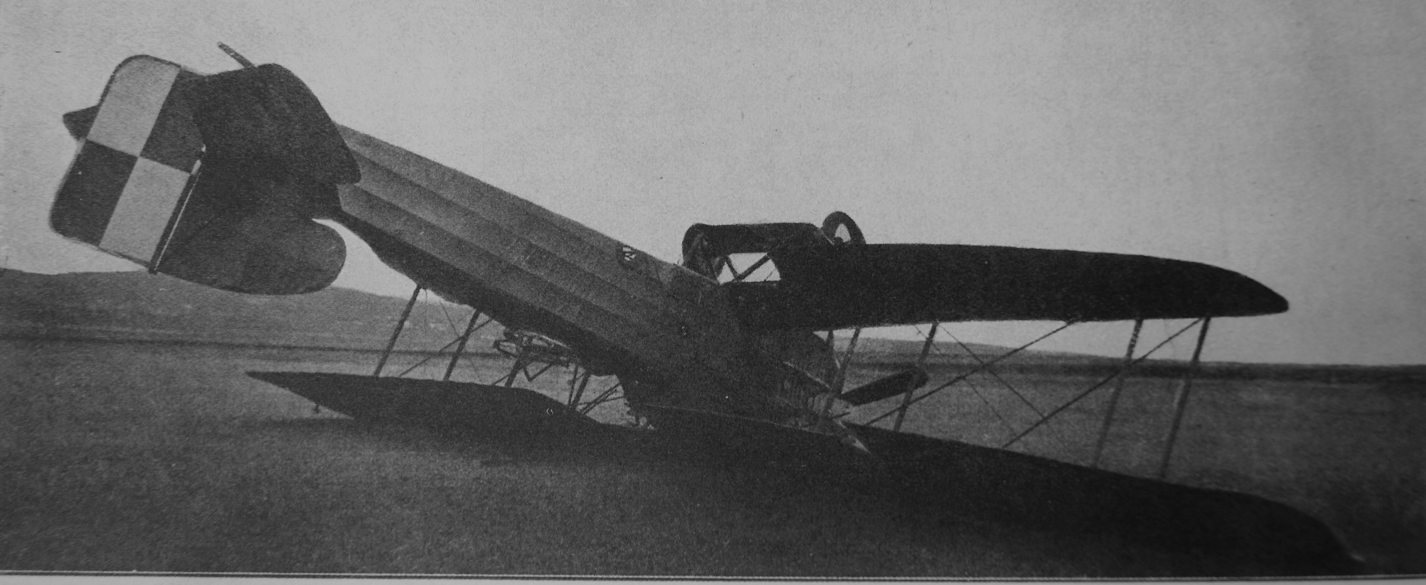 17 eskadra wywiadowcza - klasyczny kapotaż